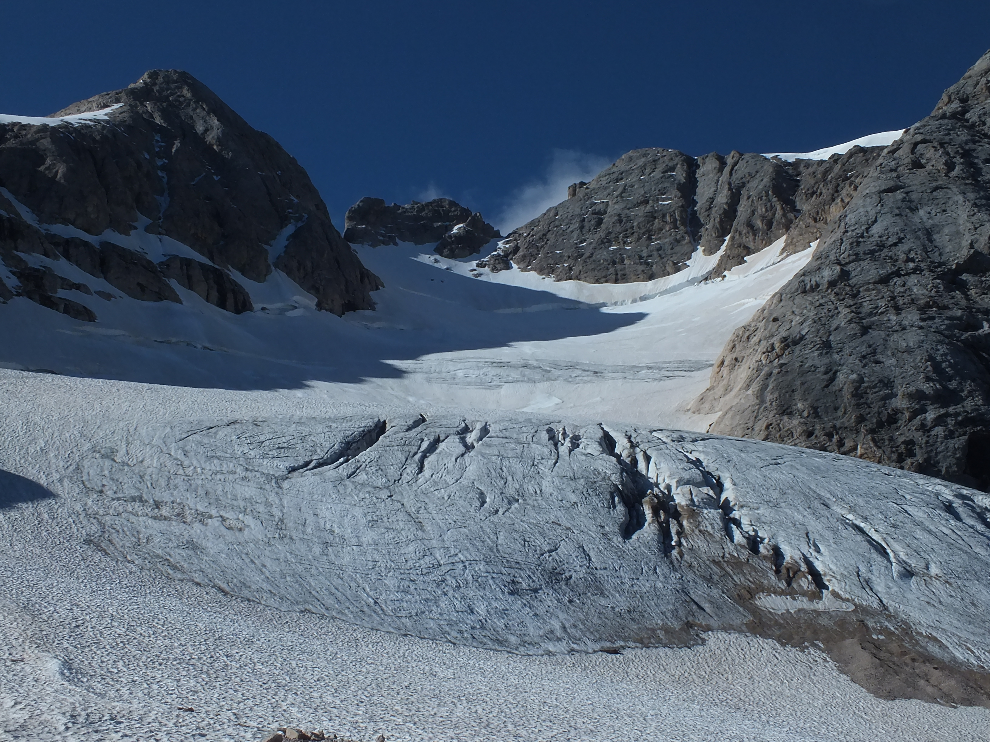 Ghiacciaio Marmolada (Q49967554)